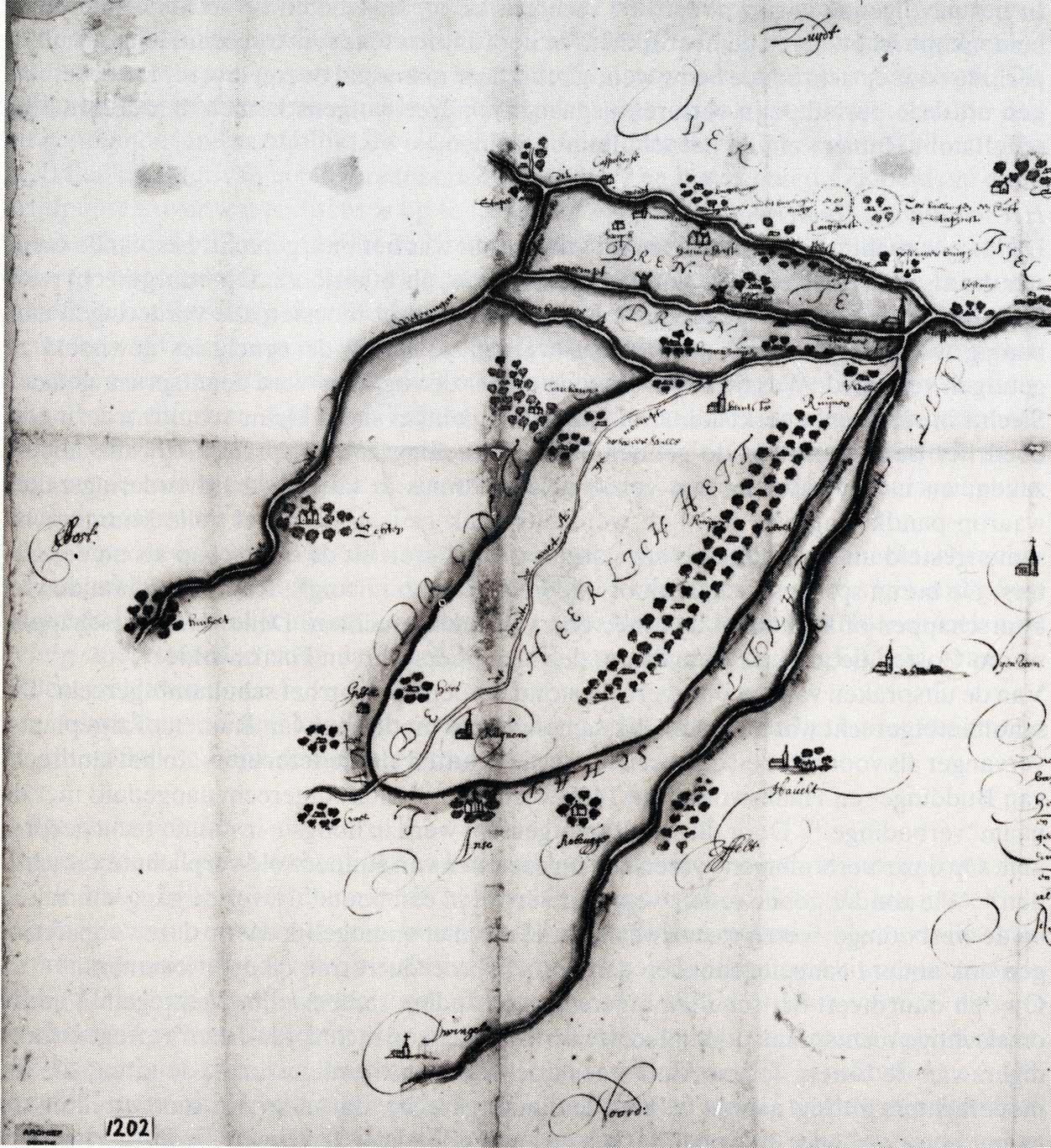 kaart van de Heerlijkheid Ruinen